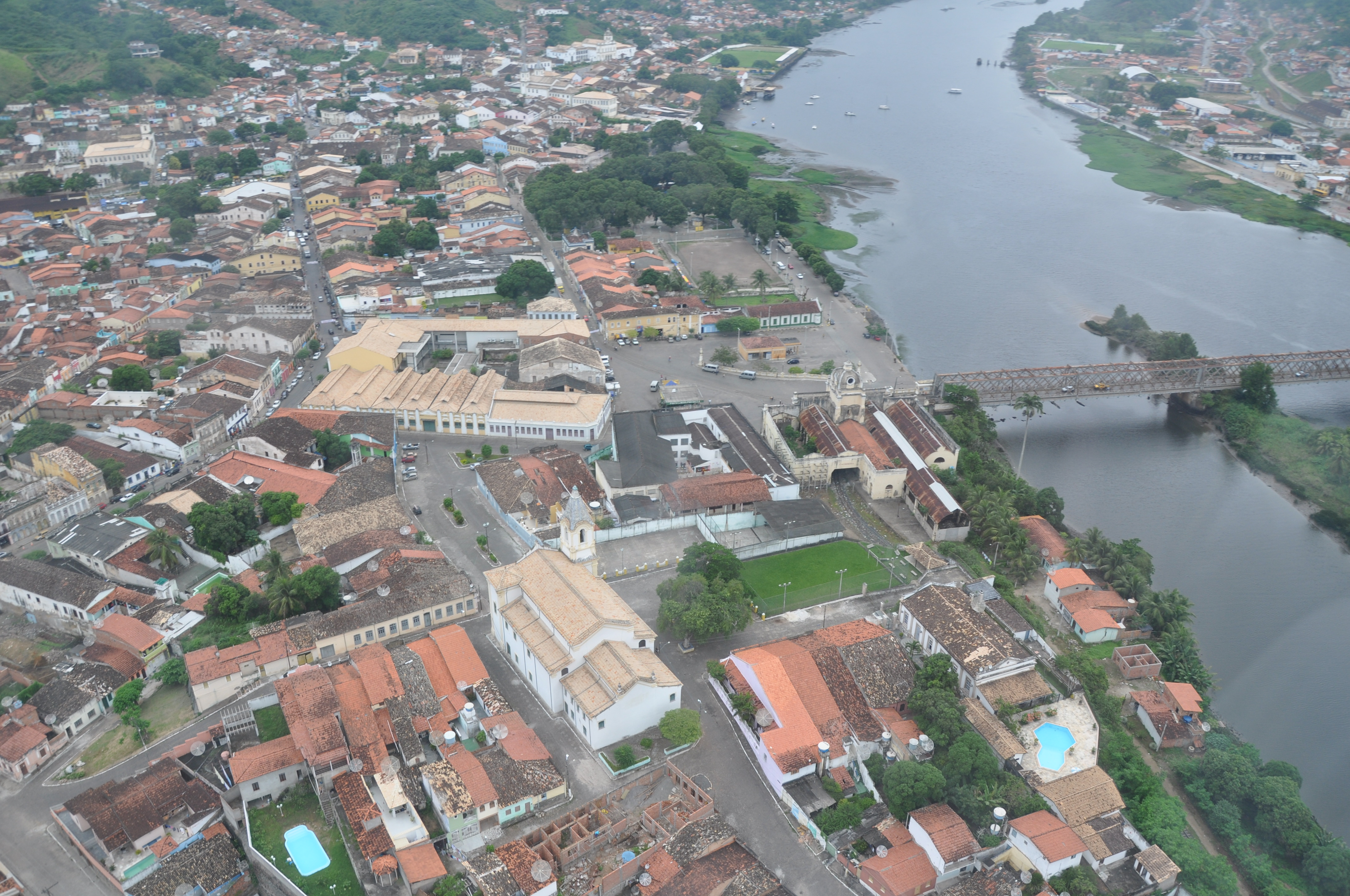 Foto aérea de Cachoeira e Rio Paraguaçu